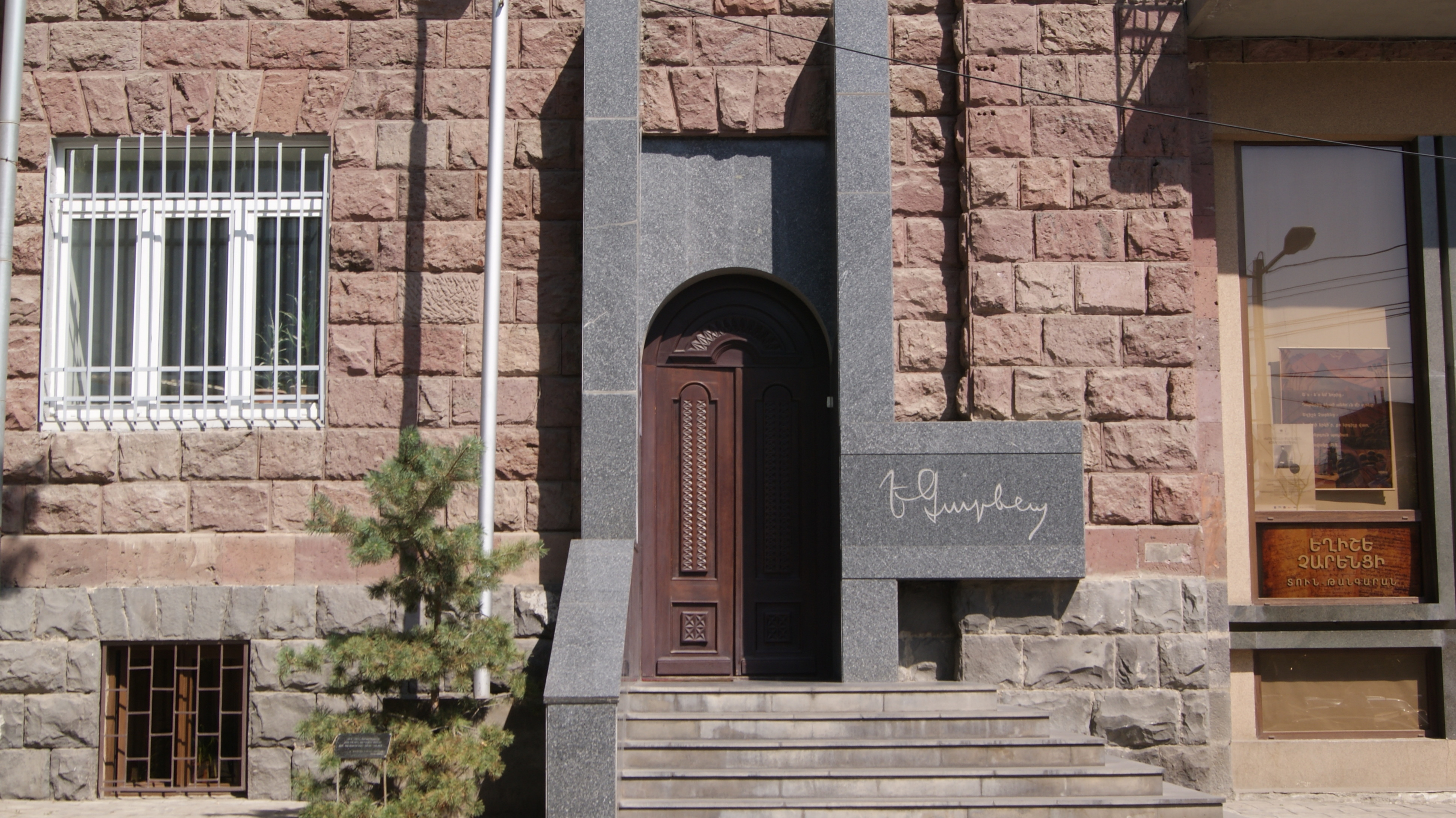 Եղիշե Չարենցի տուն-թանգարան 6/174